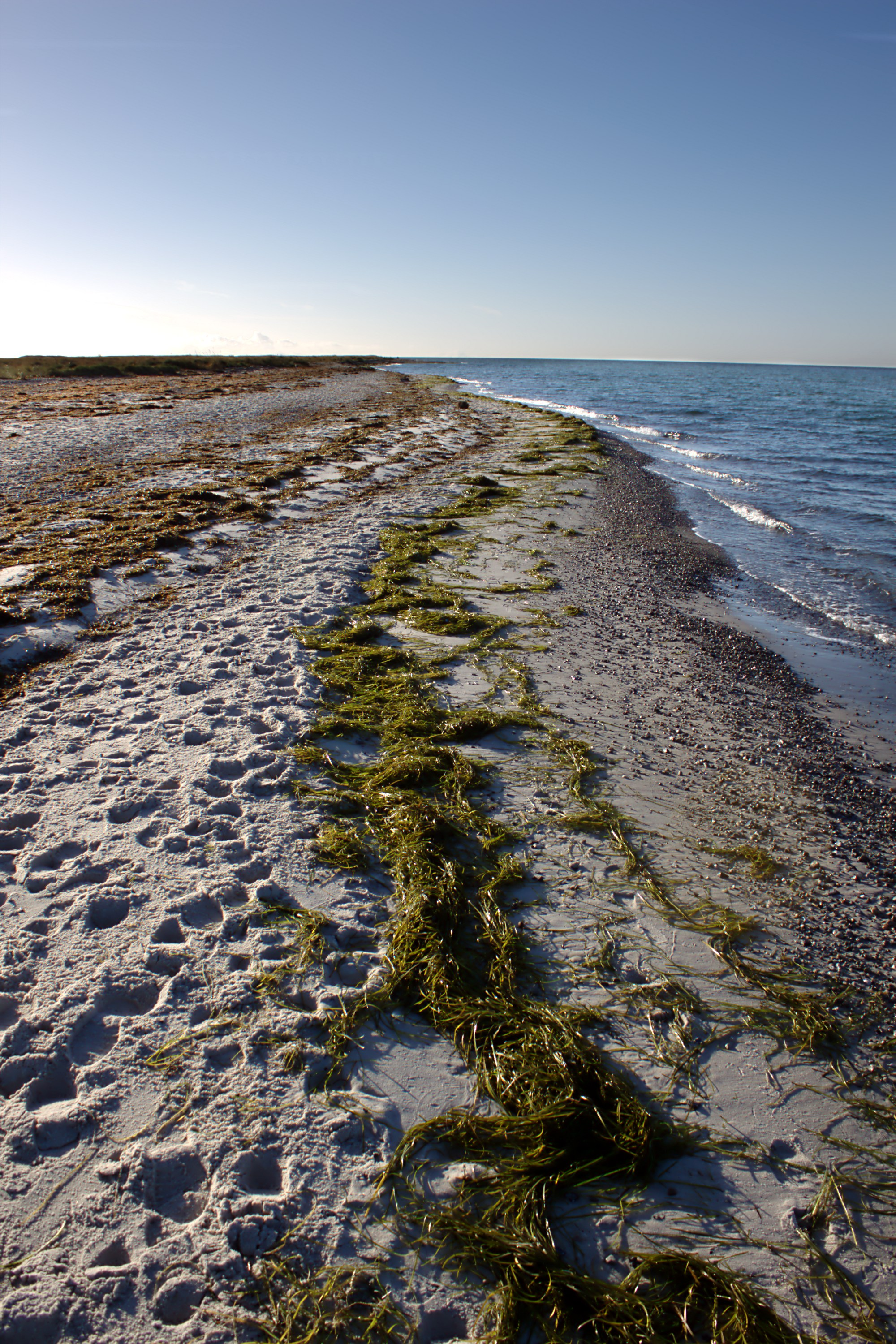 En bit av strandremsan som gör upp landdelen av naturreservatet Måkläppen.